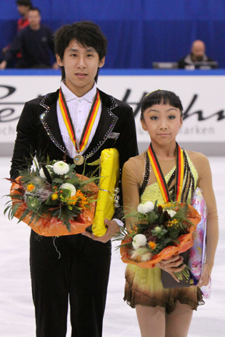 2009 Junior Grand Prix in Dresden (Pokal der Blauen Schwerter) - Sui Wenjing and Han Cong